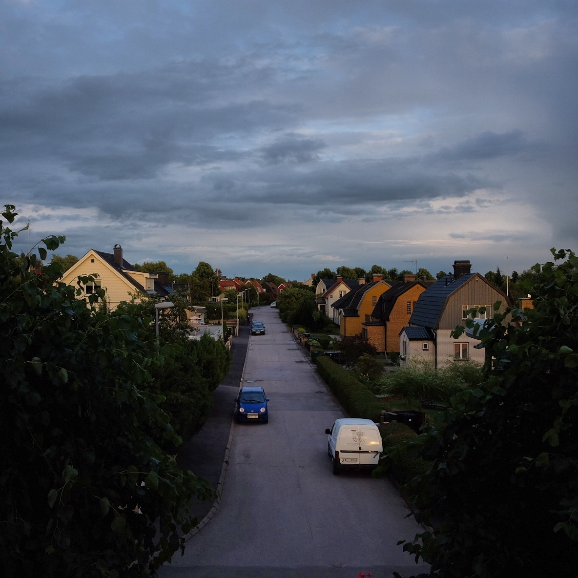 Krokvägen, Norrköping.